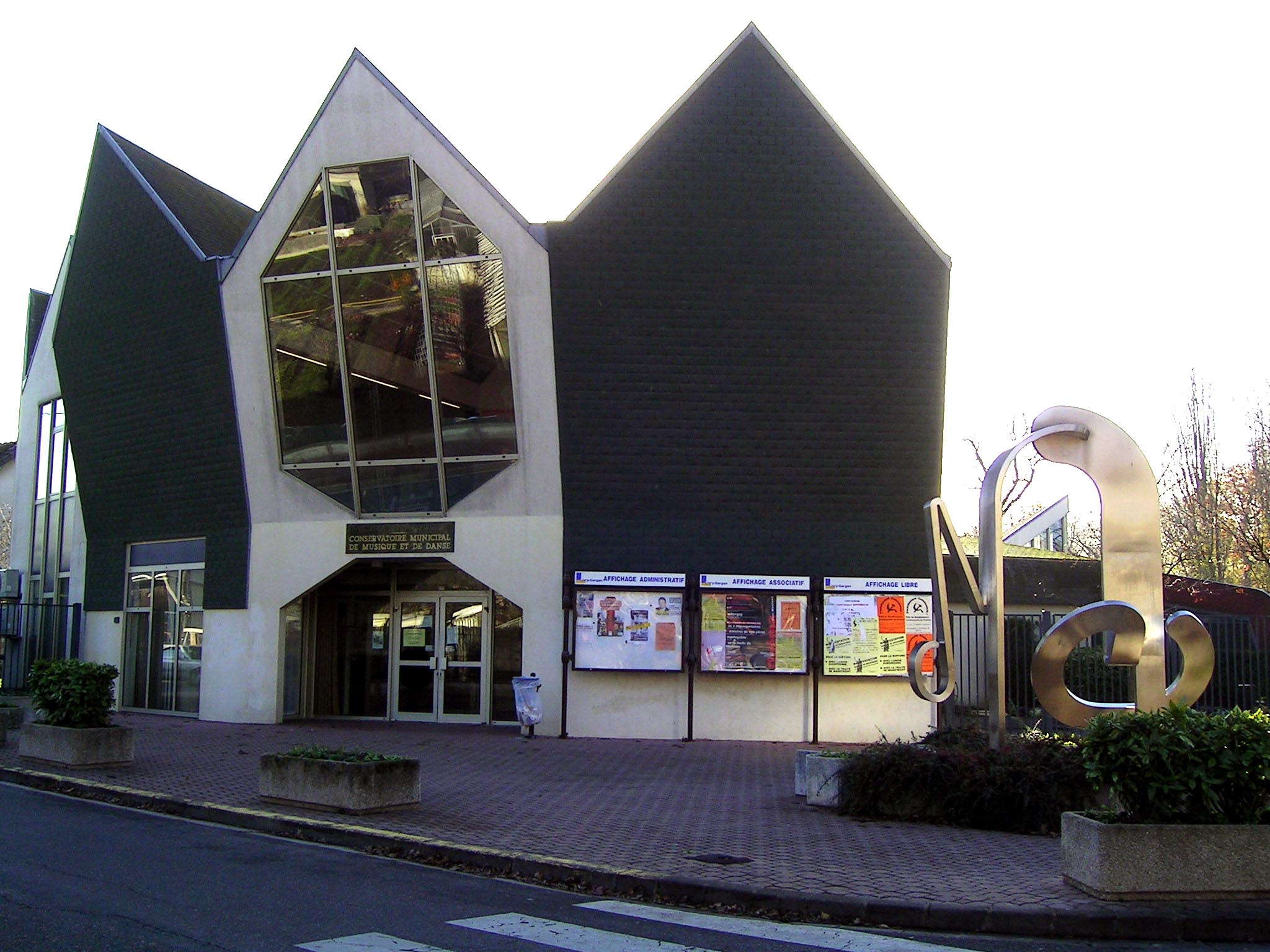 Livry-Gargan (France) - Le Conservatoire municipal de musique et de danse - Novembre 2006 Photo personnelle (own work) de Marianna